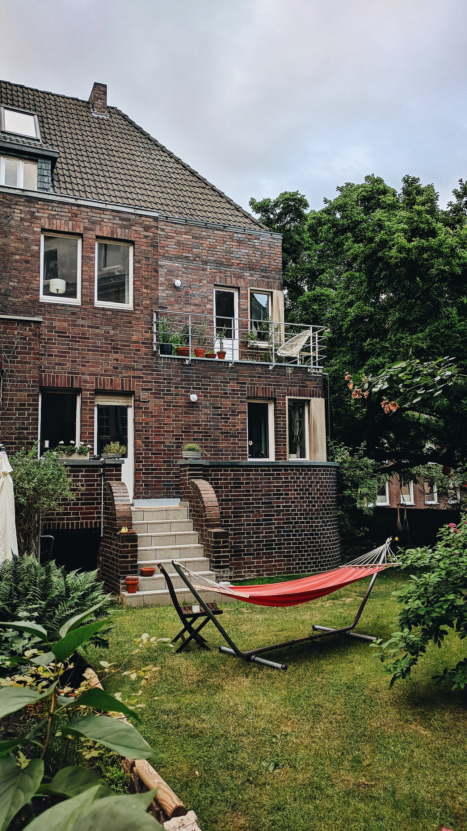 Rückansicht des Haus Irskens. Sittardstraße 63 in Mönchengladbach. Kubische Formensprache. Architekt Hubert Rademacher.